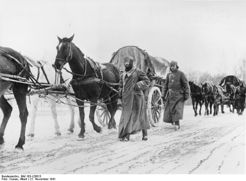 Rußland - bei Targowi Sawod Vormarsch unserer Truppen durch die Winterlandschaft vor Moskau. Die Wege sind gefroren und trotz der Kälte geht es leicht vorwärts. Kriegsberichter Cusian 21.11.41 10322-41